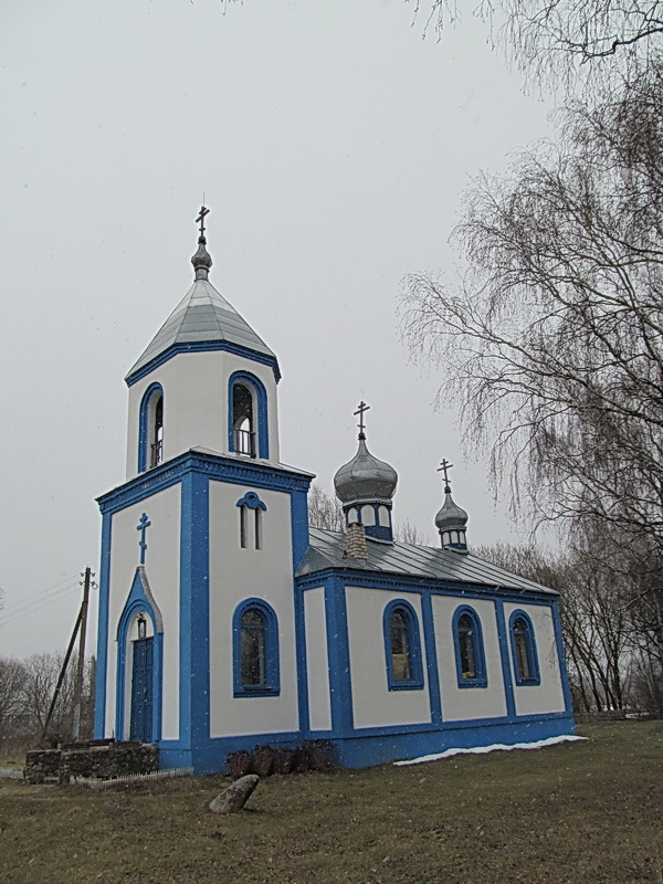 Вялікія Нястанавічы. Царква